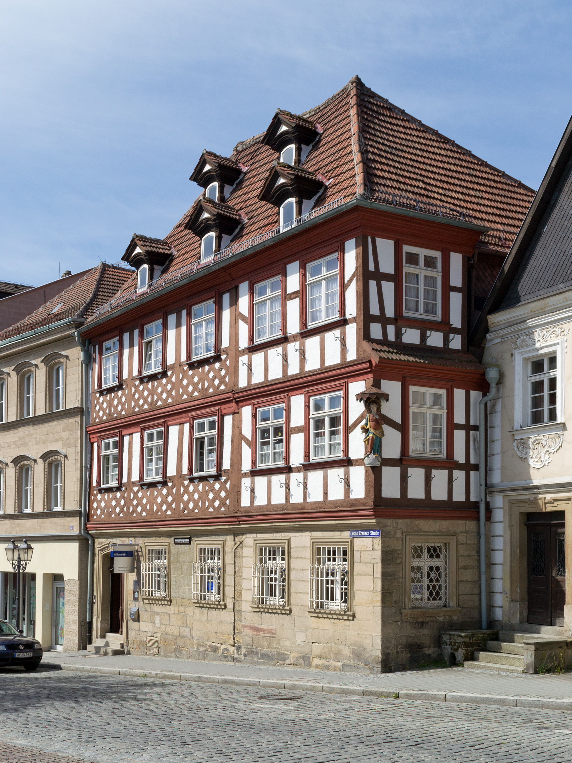 Lucas-Cranach-Straße 25 in Kronach, Pabstmannsches Stipendienhaus